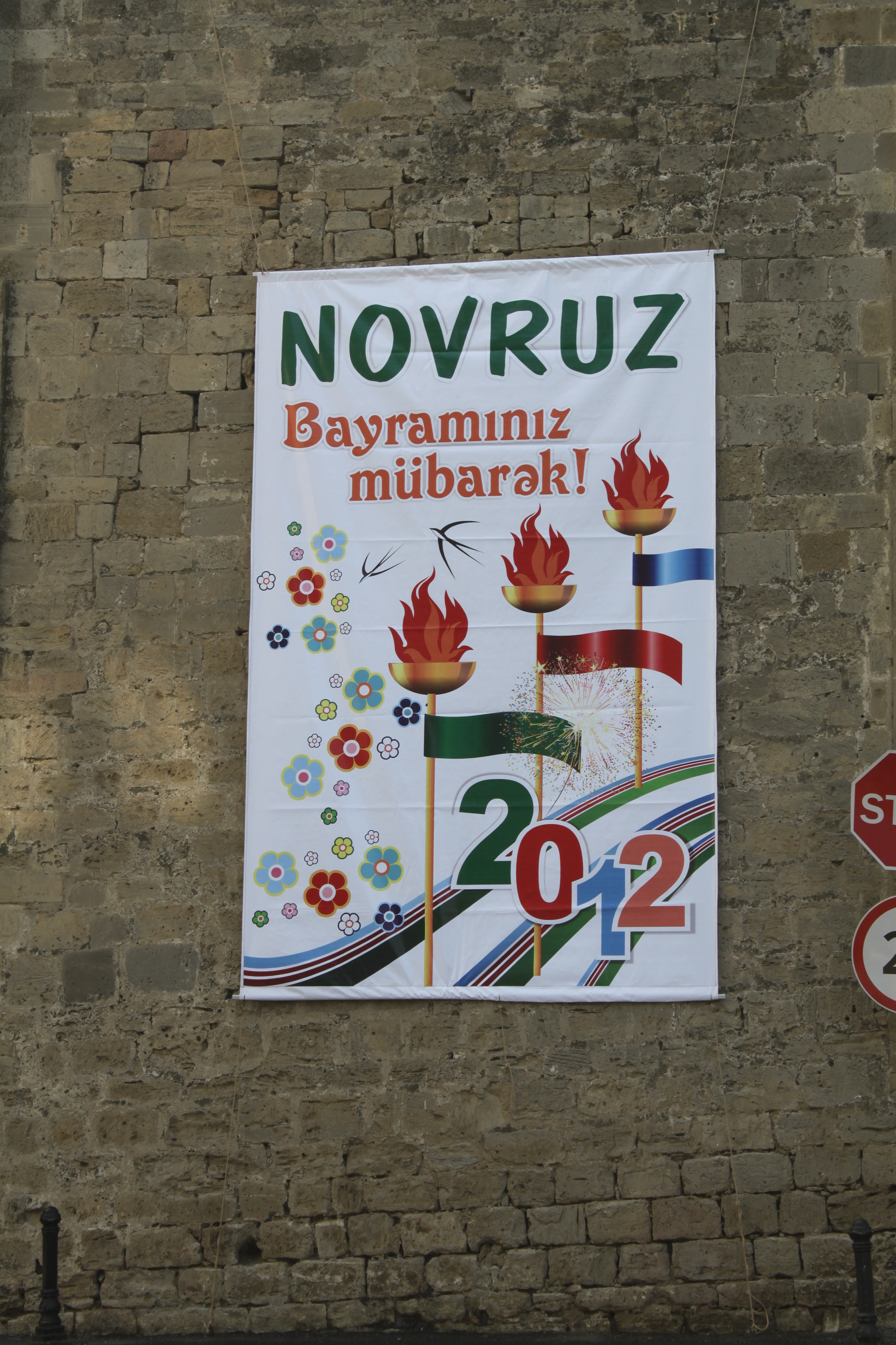 Празднование Новруза в Баку (У ворот Старого города)